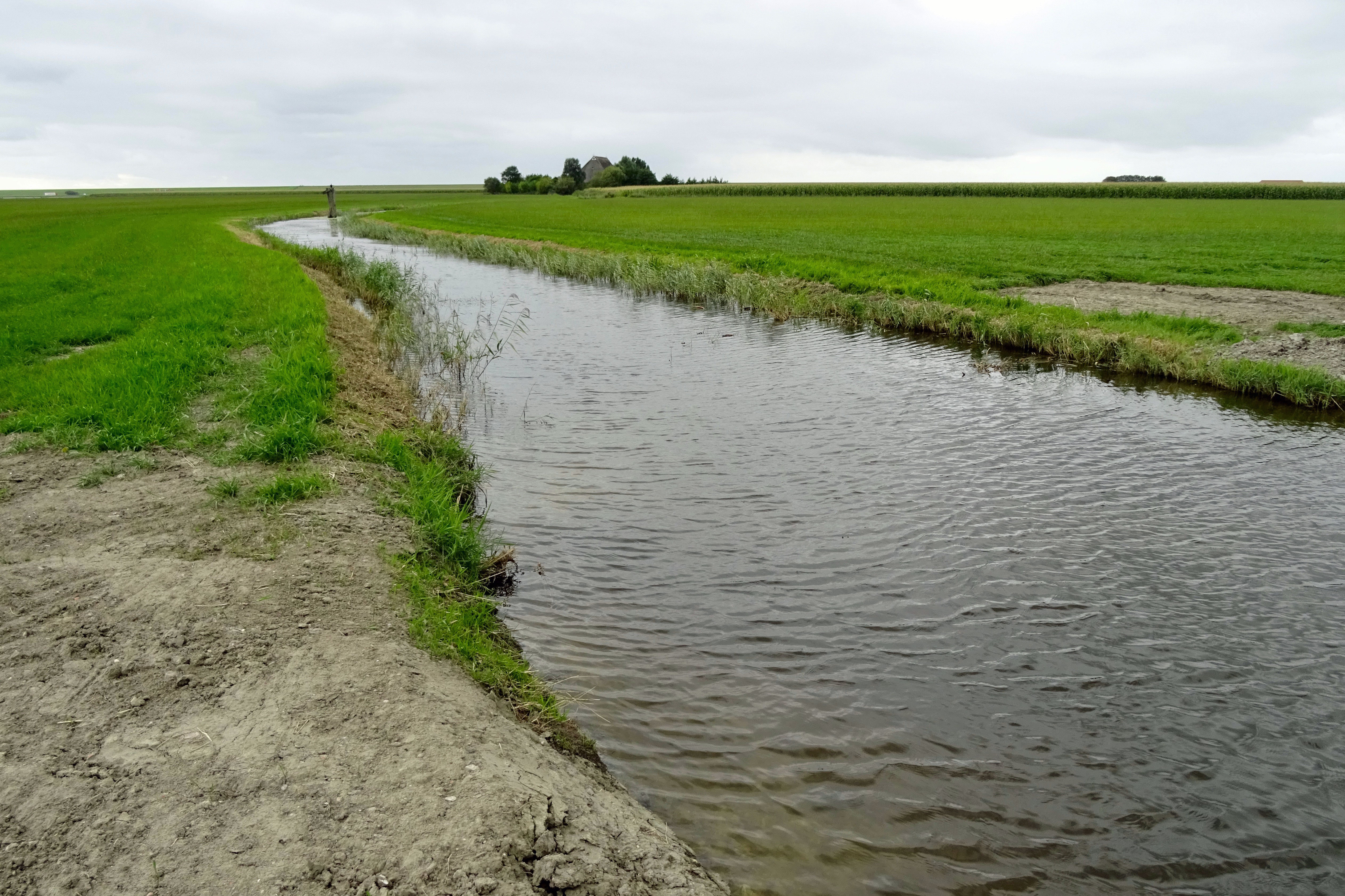 De Bedelaarsvaart (Bidlersfeart) nabij De Blokken